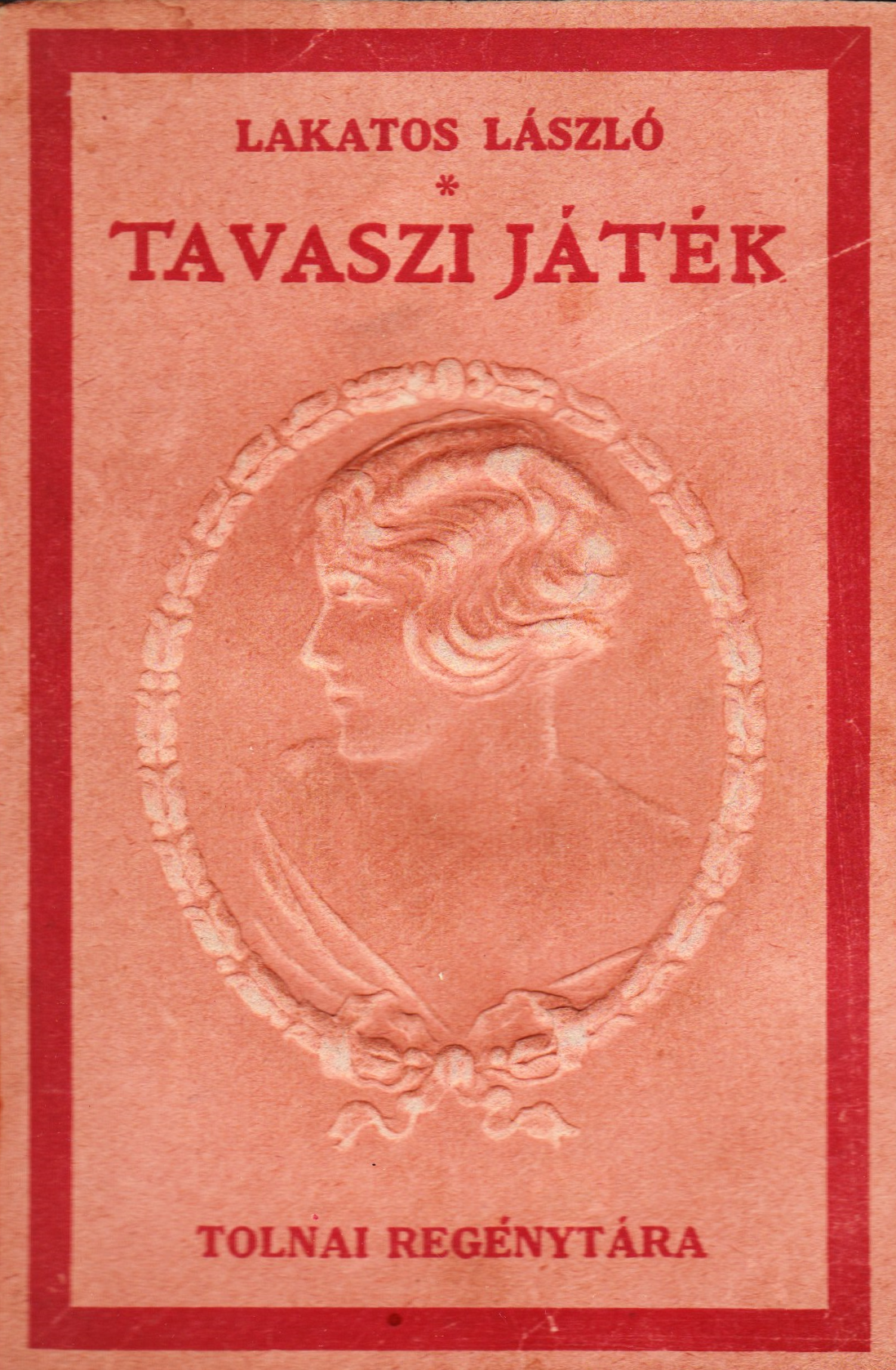 Tolnai regénytára-sorozat, Lakatos László: Tavaszi játék, 1920-as évek